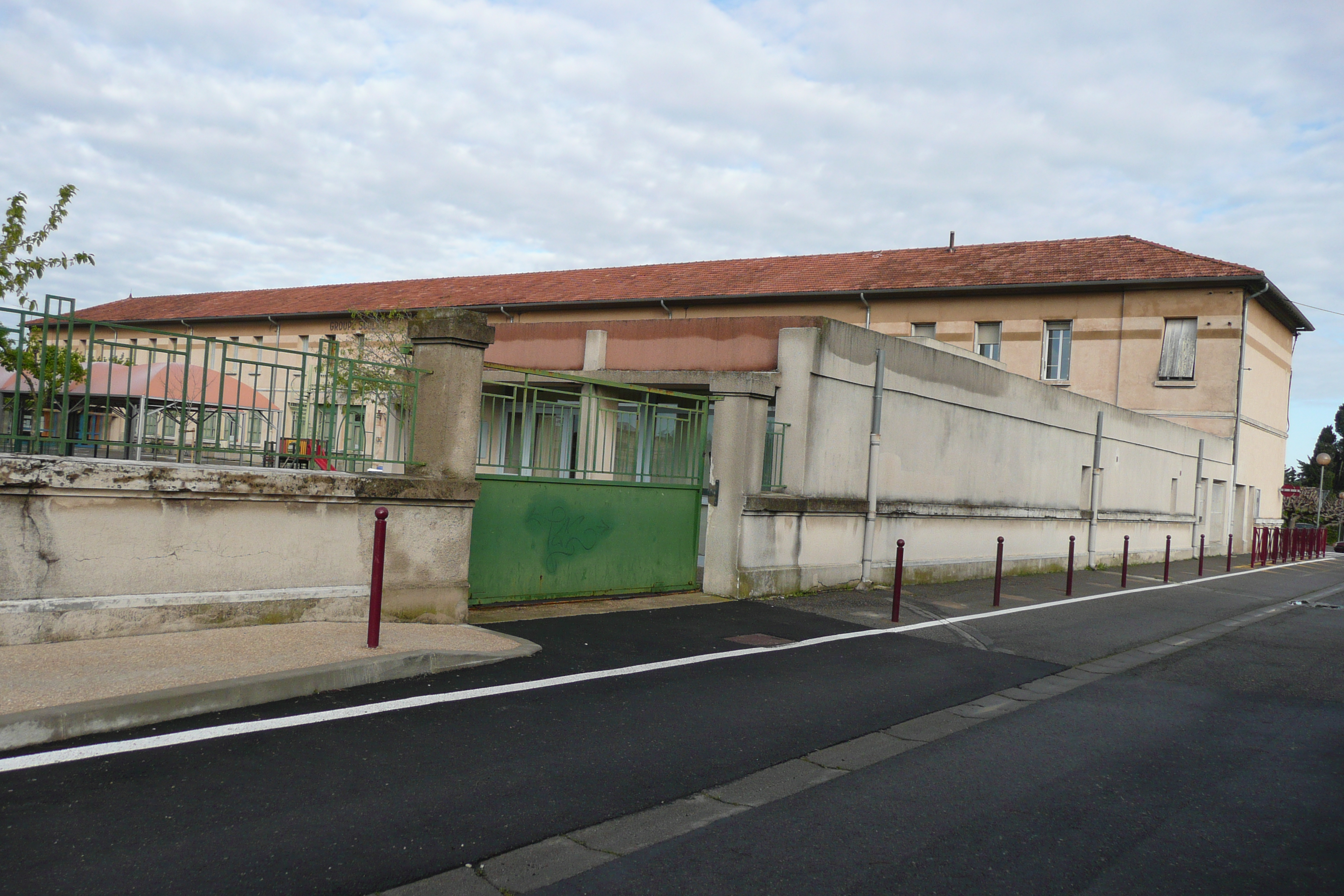 Ecole à Cheval-Blanc.